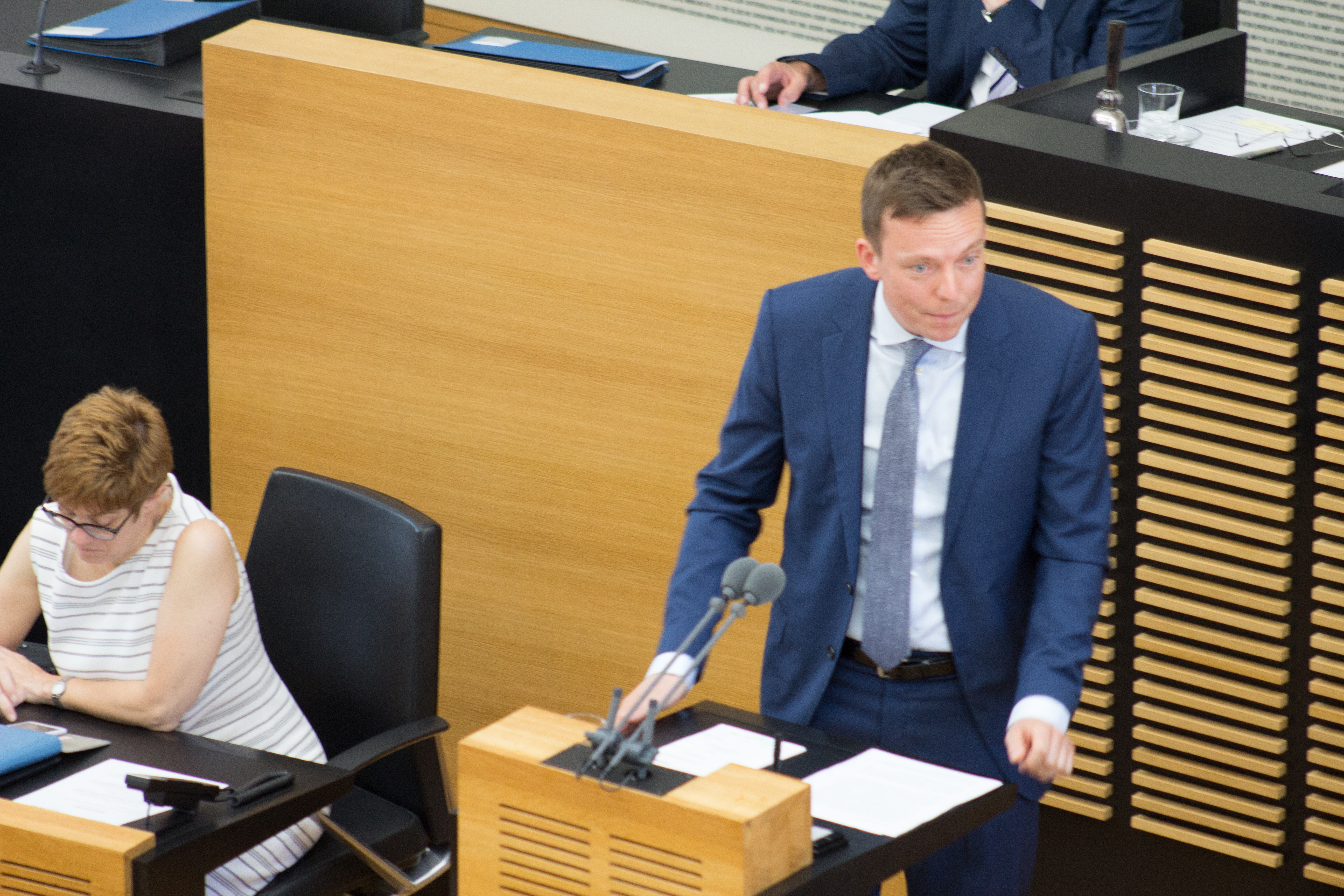 Plenarsitzung am 21. Juni 2017 im Landtag des Saarlandes -CDU Fraktionsvorsitzender Tobias Hans